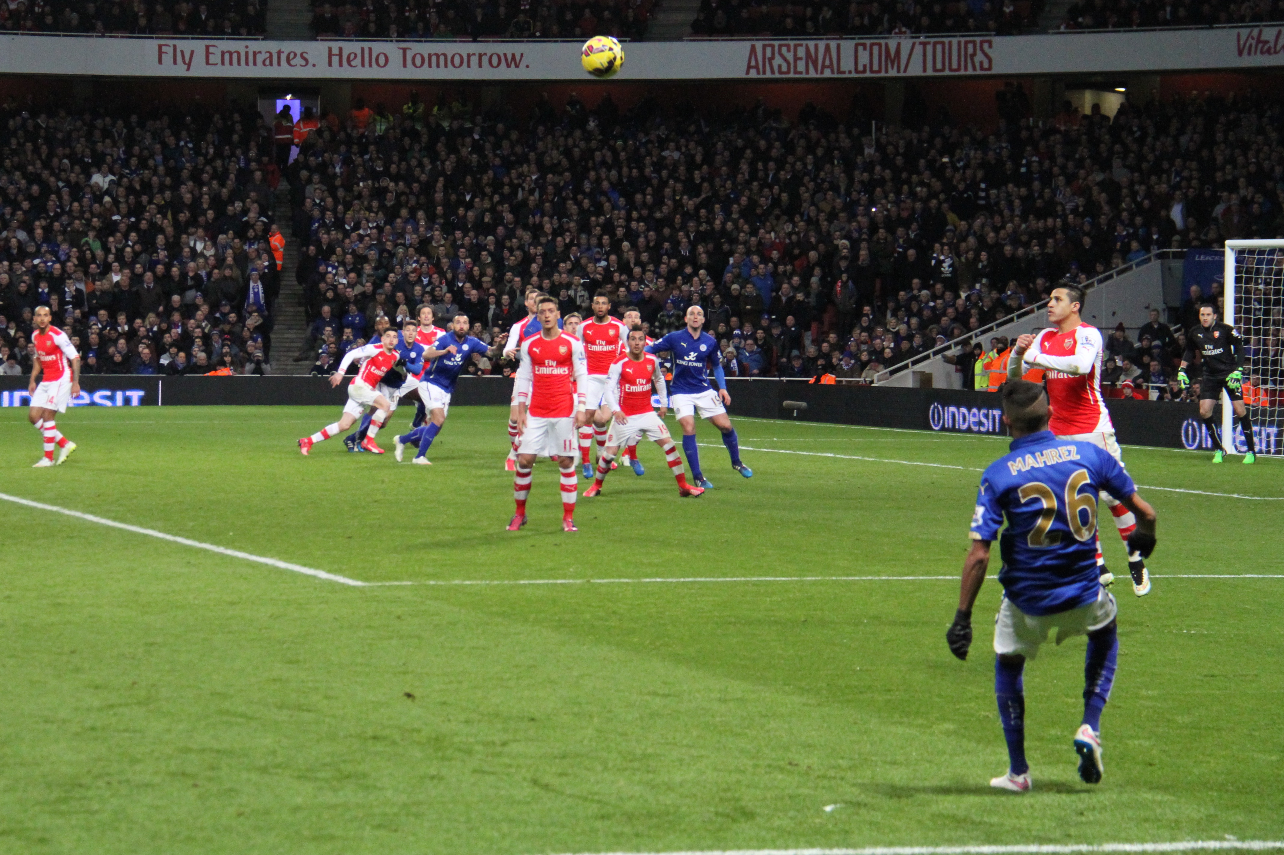 Mahrez free kick 2